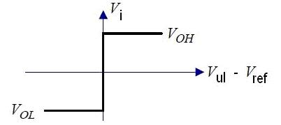 (Ja sam autor ove slike, koristim je za seminarski rad i predajem je u javno vlasništvo)